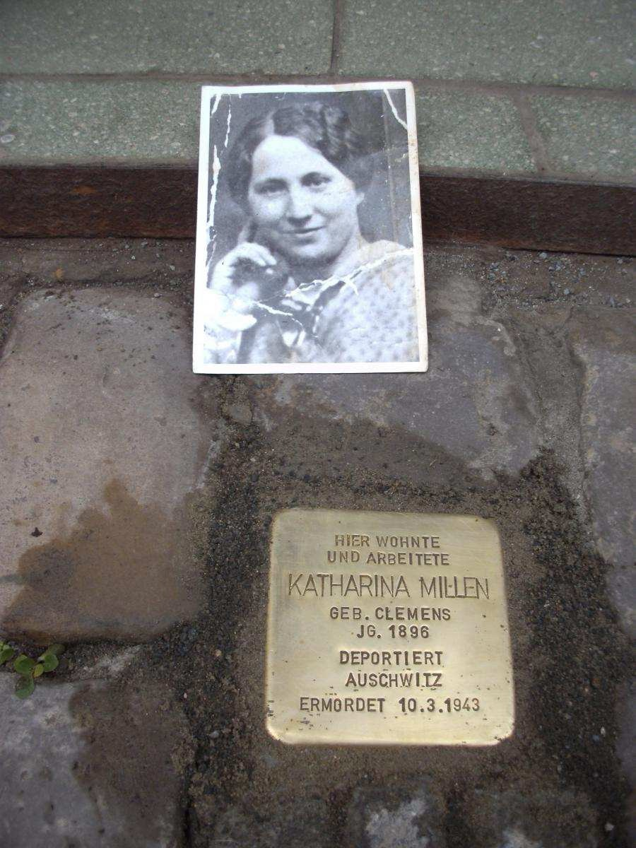 Stolperstein für und Foto von Katharina Millen geb. Clemens aus Trier.